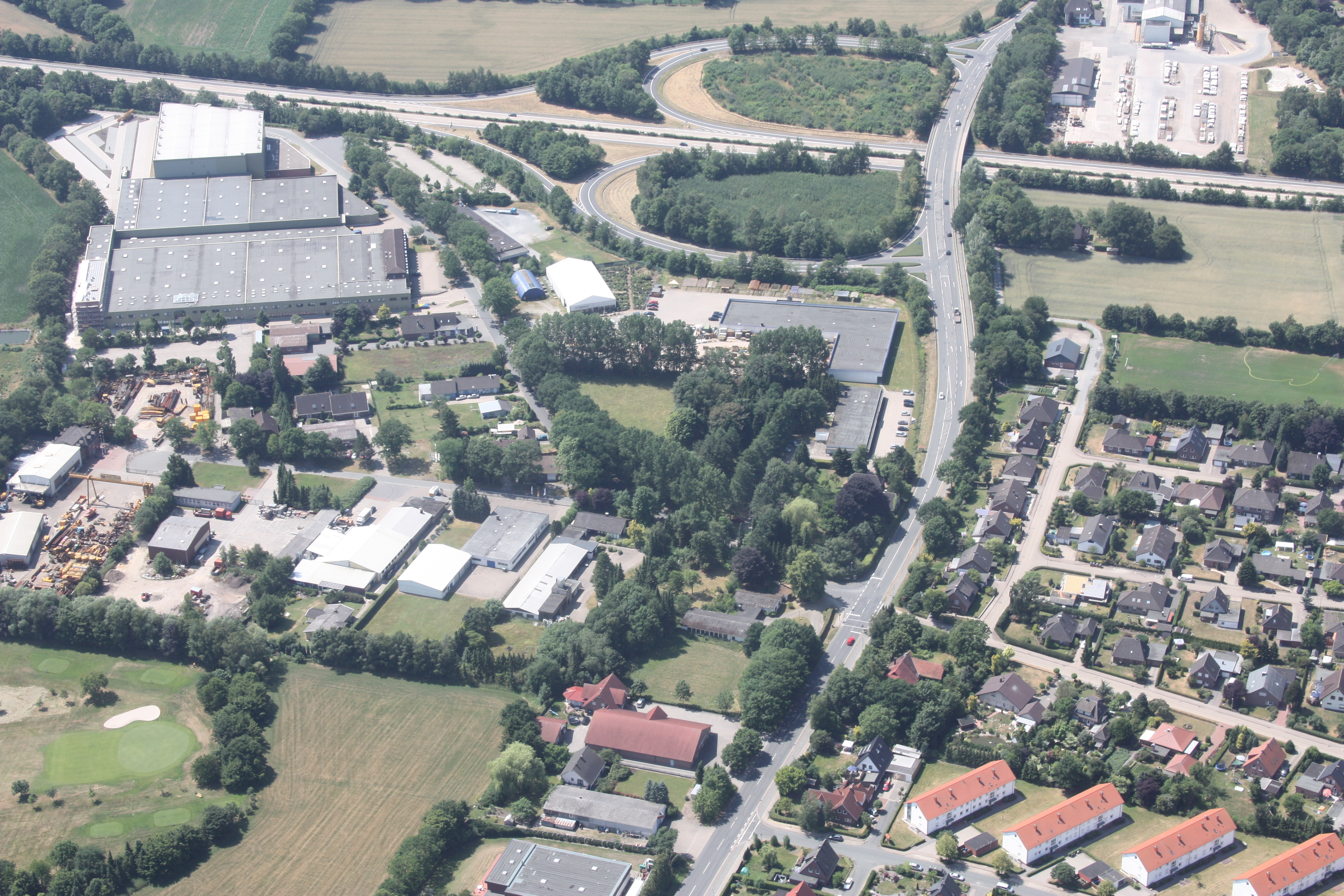 Flug über Rastede; von Varel kommend nach Oldenburg; Flughöhe 500 m = 1500 ft; Juli 2010